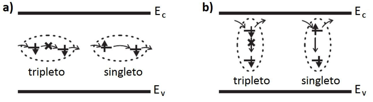 esquema de processos dependentes de spin